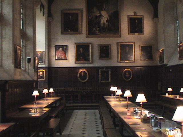 Exeter College Dining Hall, September, 2005. J Freeman